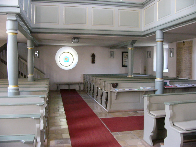 Das Innere der Christuskirche in Absberg